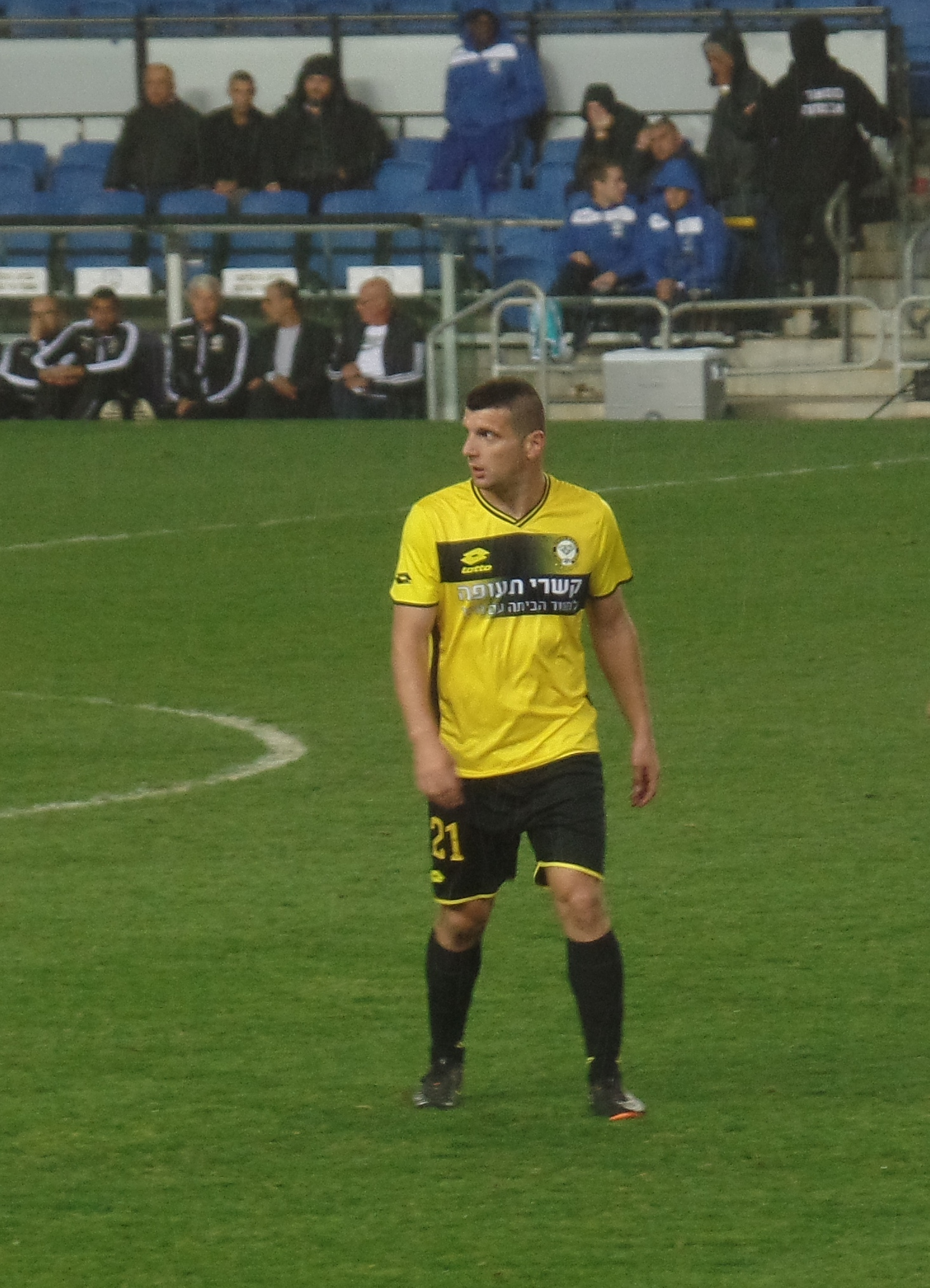 SAM 5191 פאטוס בצ'יראי